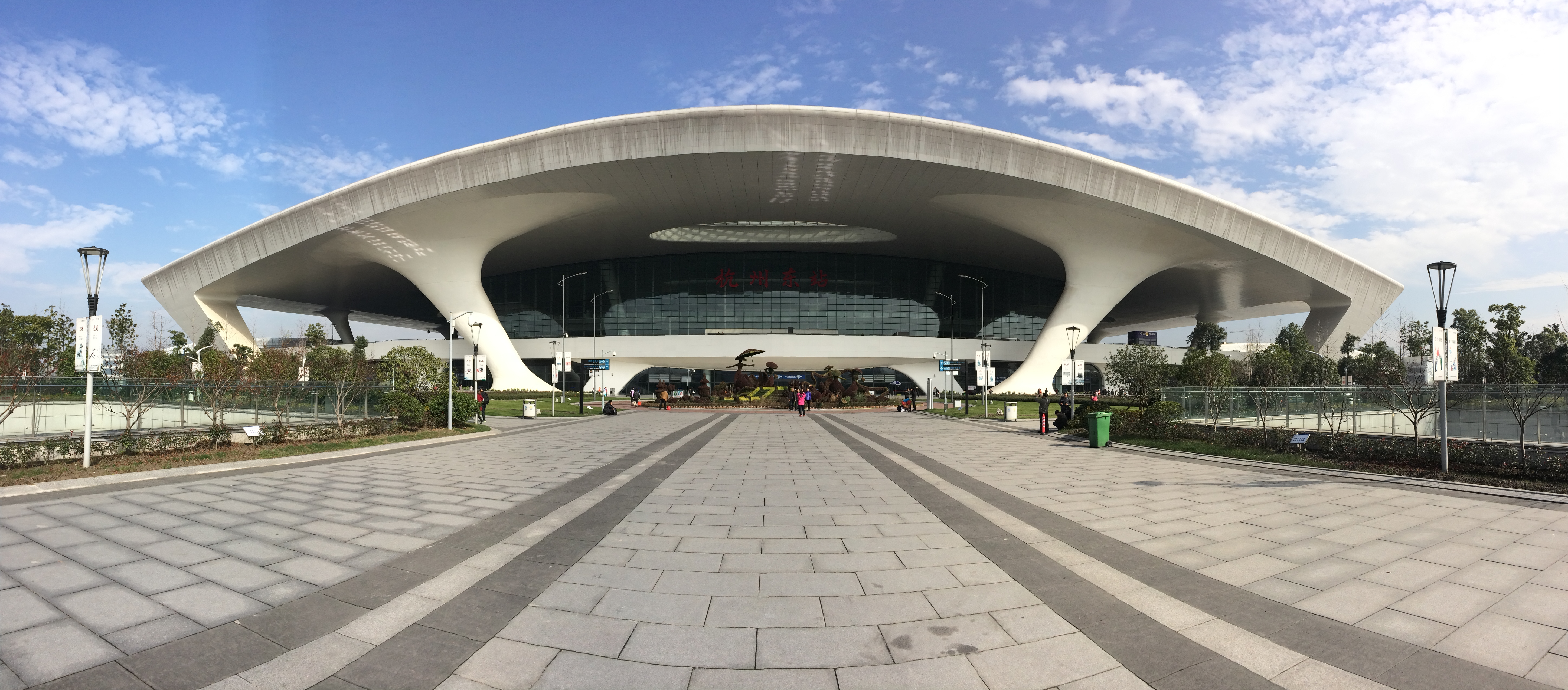 西广场杭州东站全景